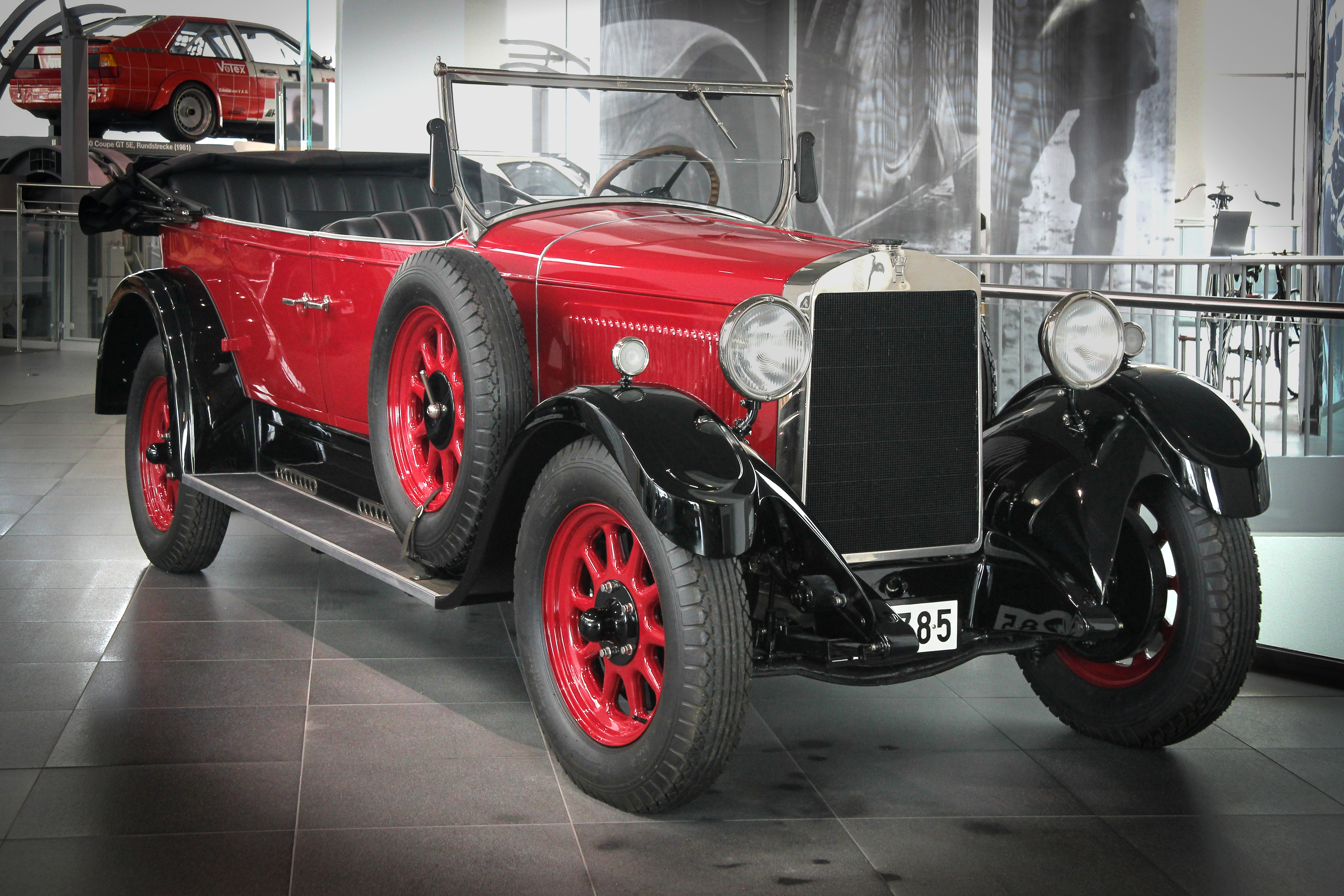 Horch 8, Typ 303, Baujahr 1927. 8-Zylinder-Reihenmotor, 3132 cm³, 60 PS bei 3200/min, Höchstgeschwindigkeit 100 km/h. 1471 Stück von 1926 bis 1927 gebaut; Preis: 11.900 RM